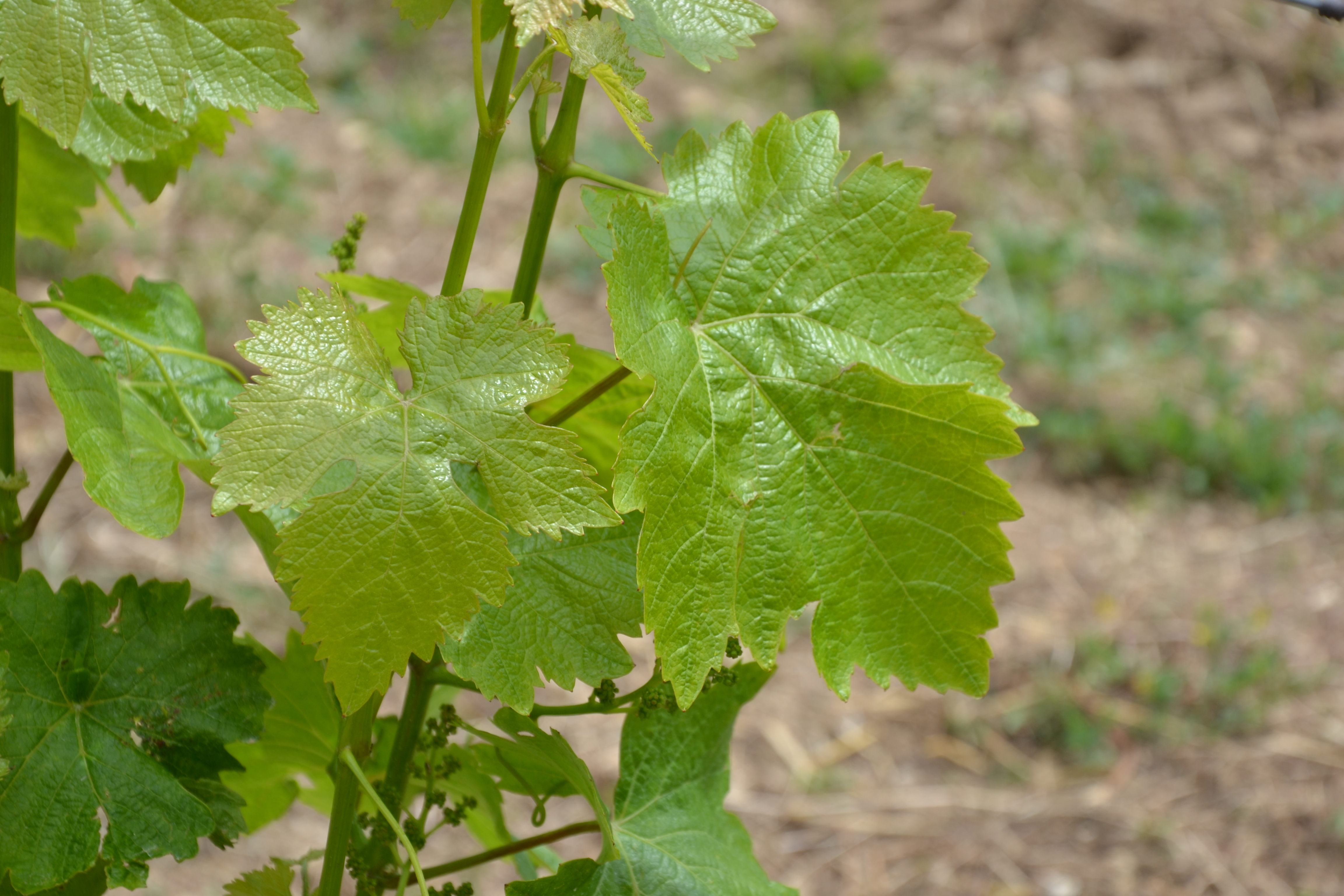 feuilles de cépage Rhoditis